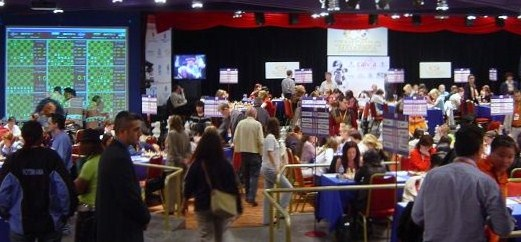 Spielsaal der Damen, Schacholympiade 2004 in Calvià